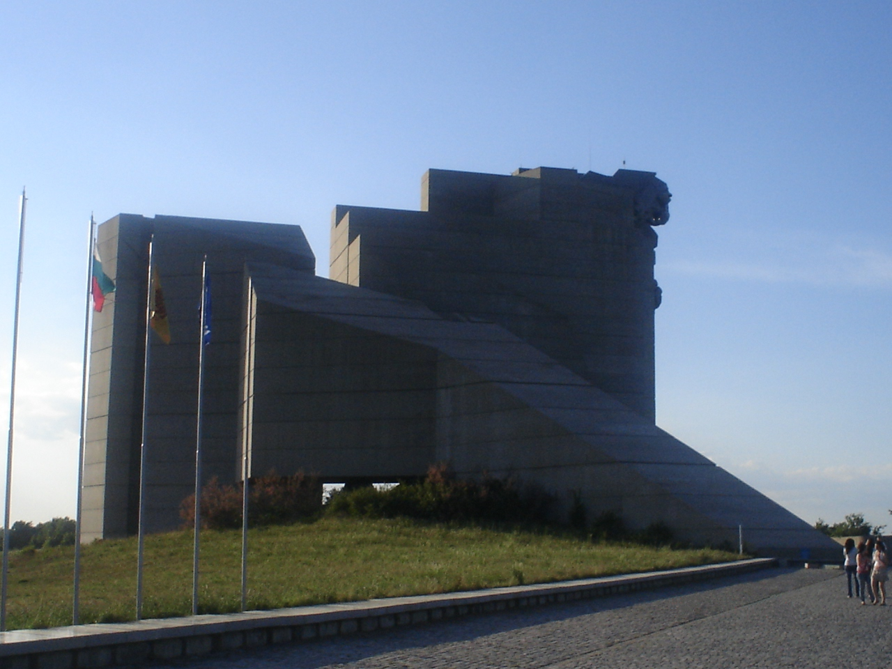 Паметник "Създатели на българската държава"